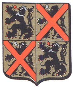 Wapen Sint-Kruis